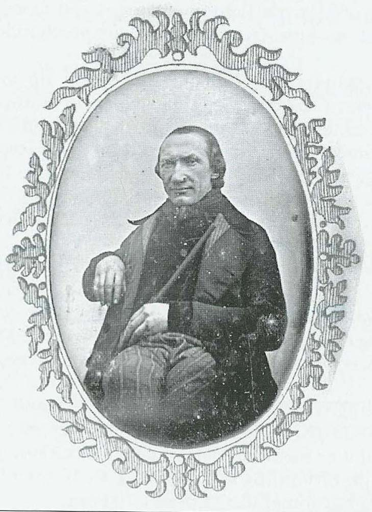 Foto van Polydoor Lippens, door hemzelf genomen in 1850 - Eeklo - Belgium